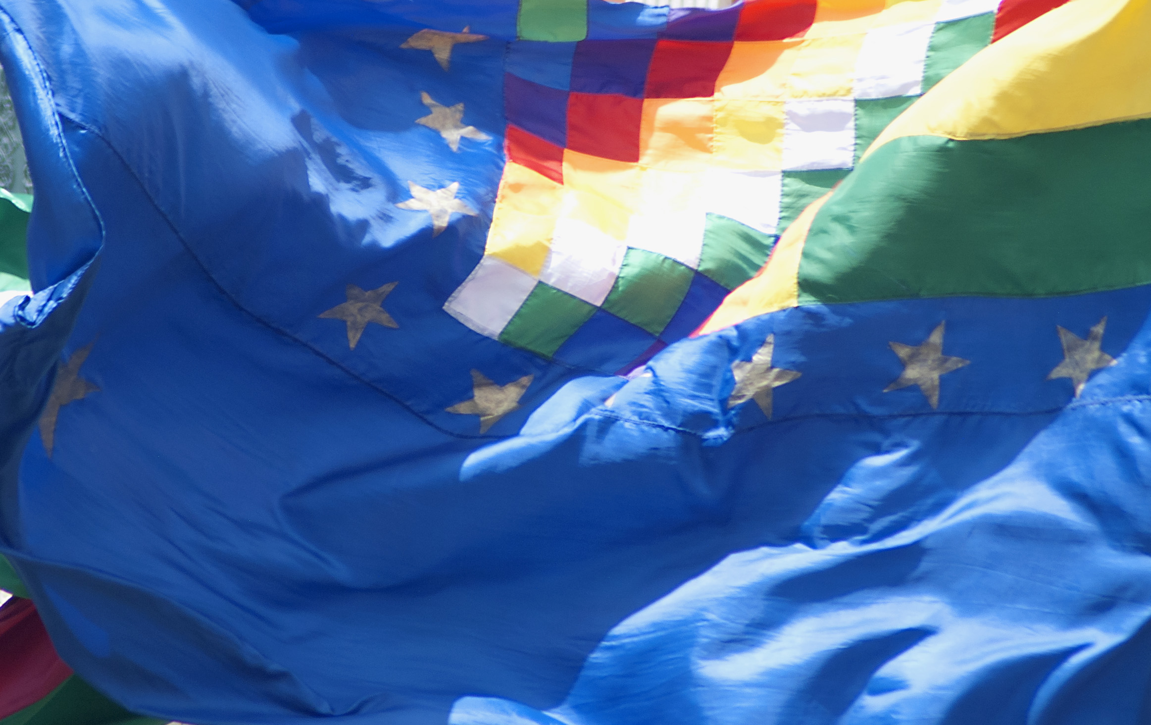 Bandera oficial de la lucha boliviana por el mar perdido